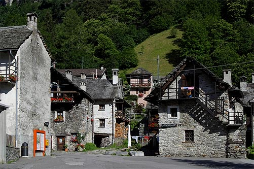 Sonogno